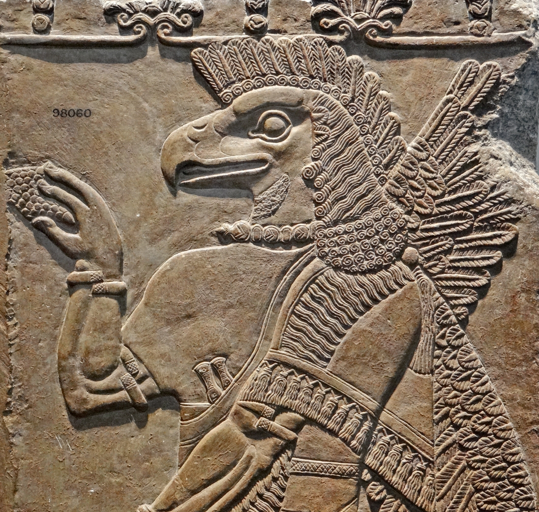 Esprit protecteur à tête d'aigle environ 865-860 avant notre ère Temple de Ninurta Nimrud, Assyrie Le Proche-Orient ancien (British Museum)